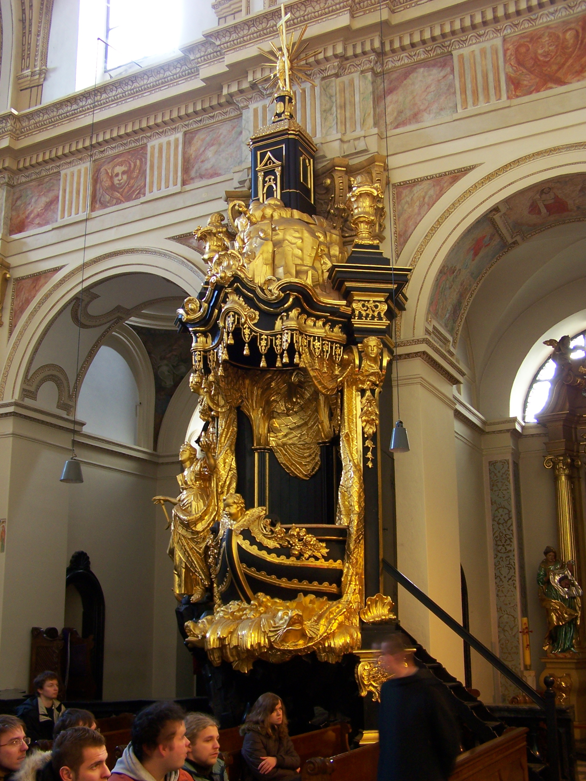 Ambona w kościele przyklasztornym w Tyńcu.